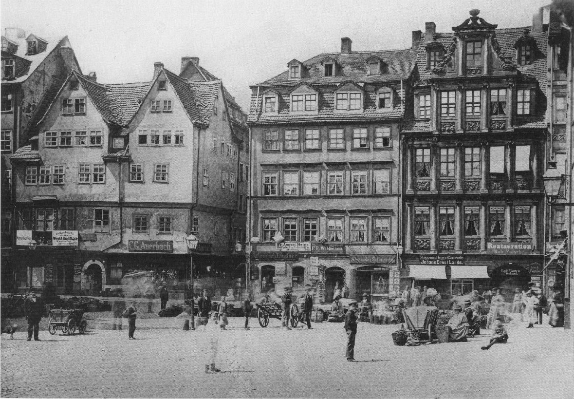 Nikolaistraße Nr. 9-13: Westseite von Deutrichs Hof (rechts), erbaut von 1653 bis 1655 durch Andreas Egger. 1896 wurden die Häuser Nr. 11 und 13 durch einen Neubau vereint, der im 2. Weltkrieg zerstört wurde. Seit 1979 stand dort ein DDR-Bürobau, heute 2010 Hotel One(?).